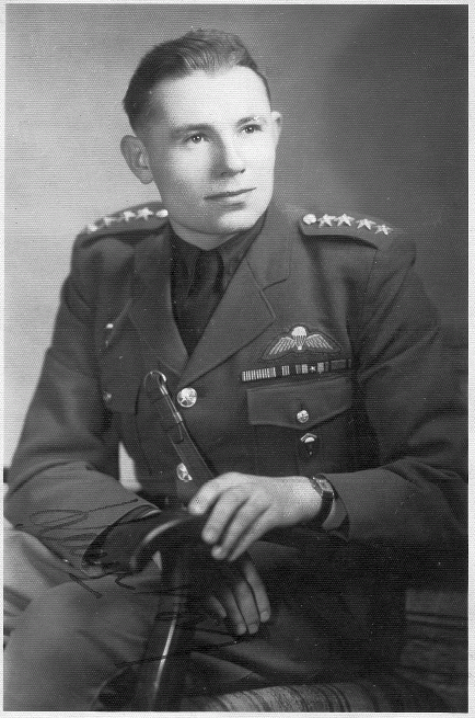 Vasil Kiš (* 17. listopadu 1920 Poroškovo, Podkarpatská Rus)